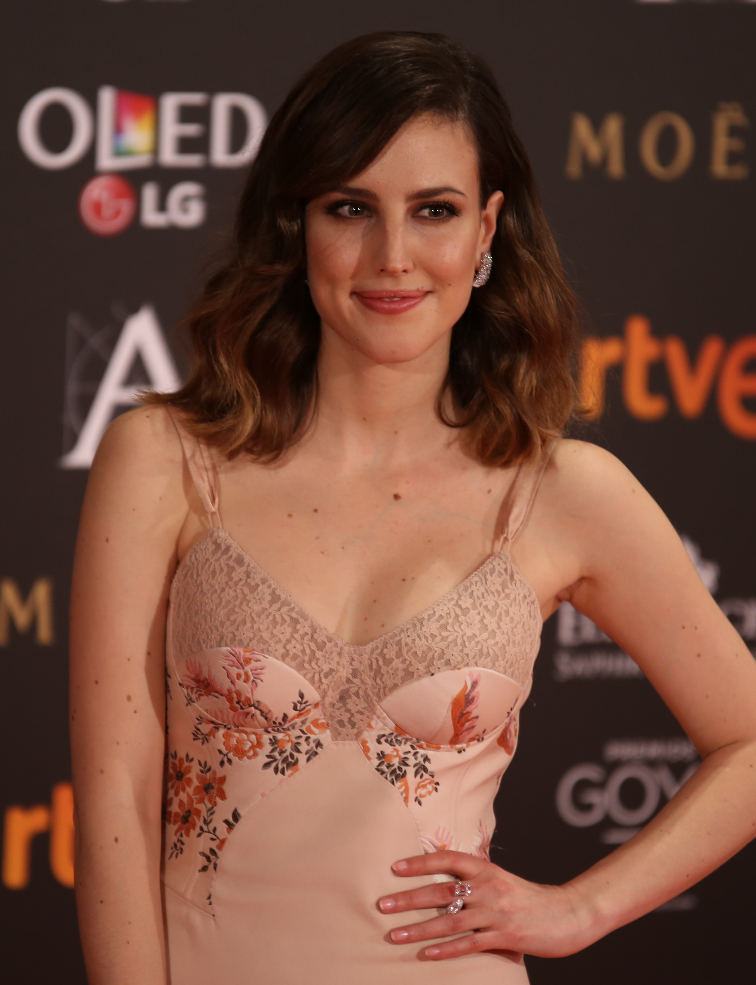 Premios Goya 2017